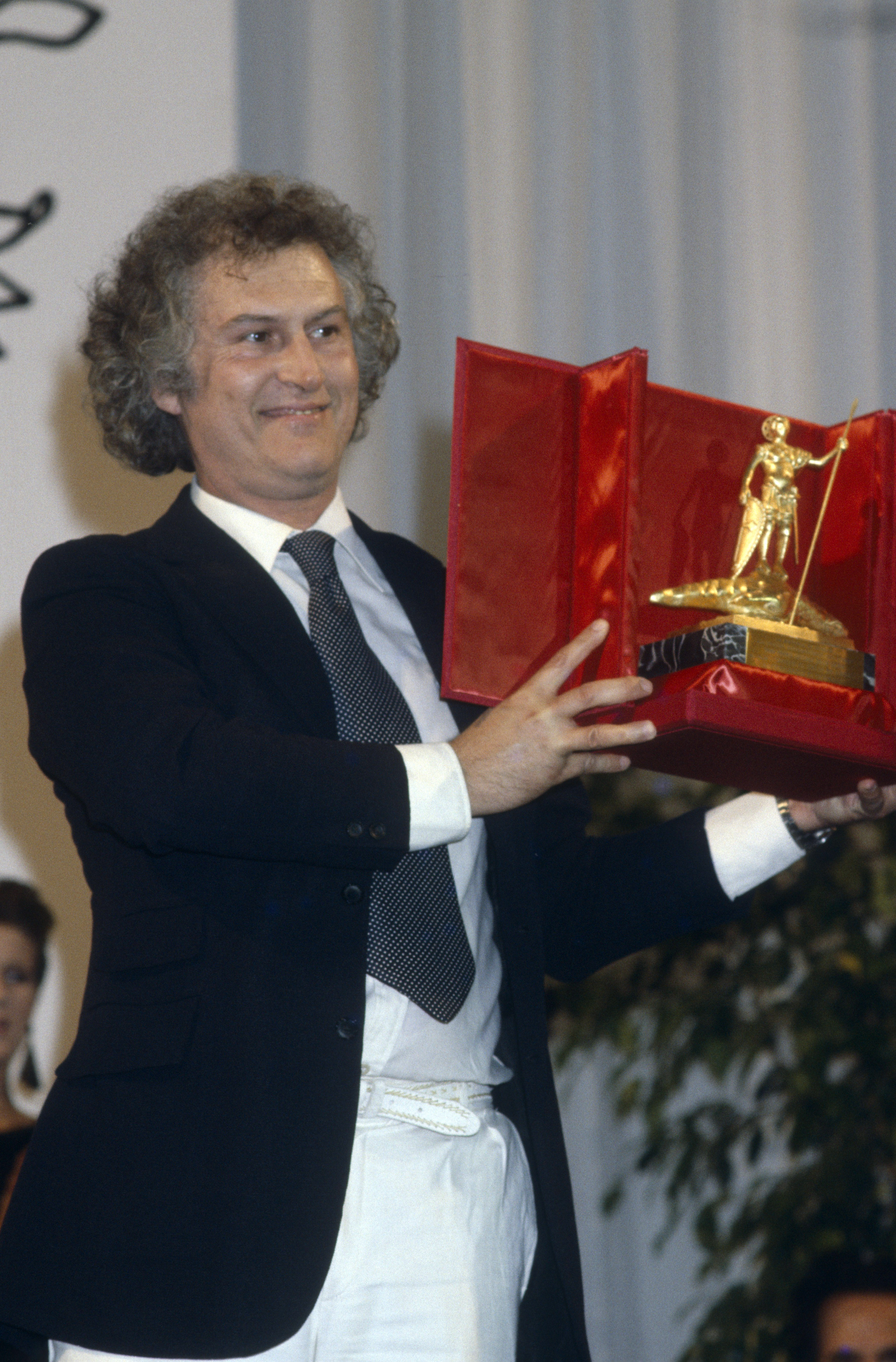 fernando solanas, premio speciale della giuria alla mostra del cinema di Venezia del 1985